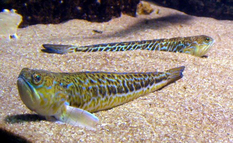 Gewöhnliches Petermännchen (Trachinus draco)